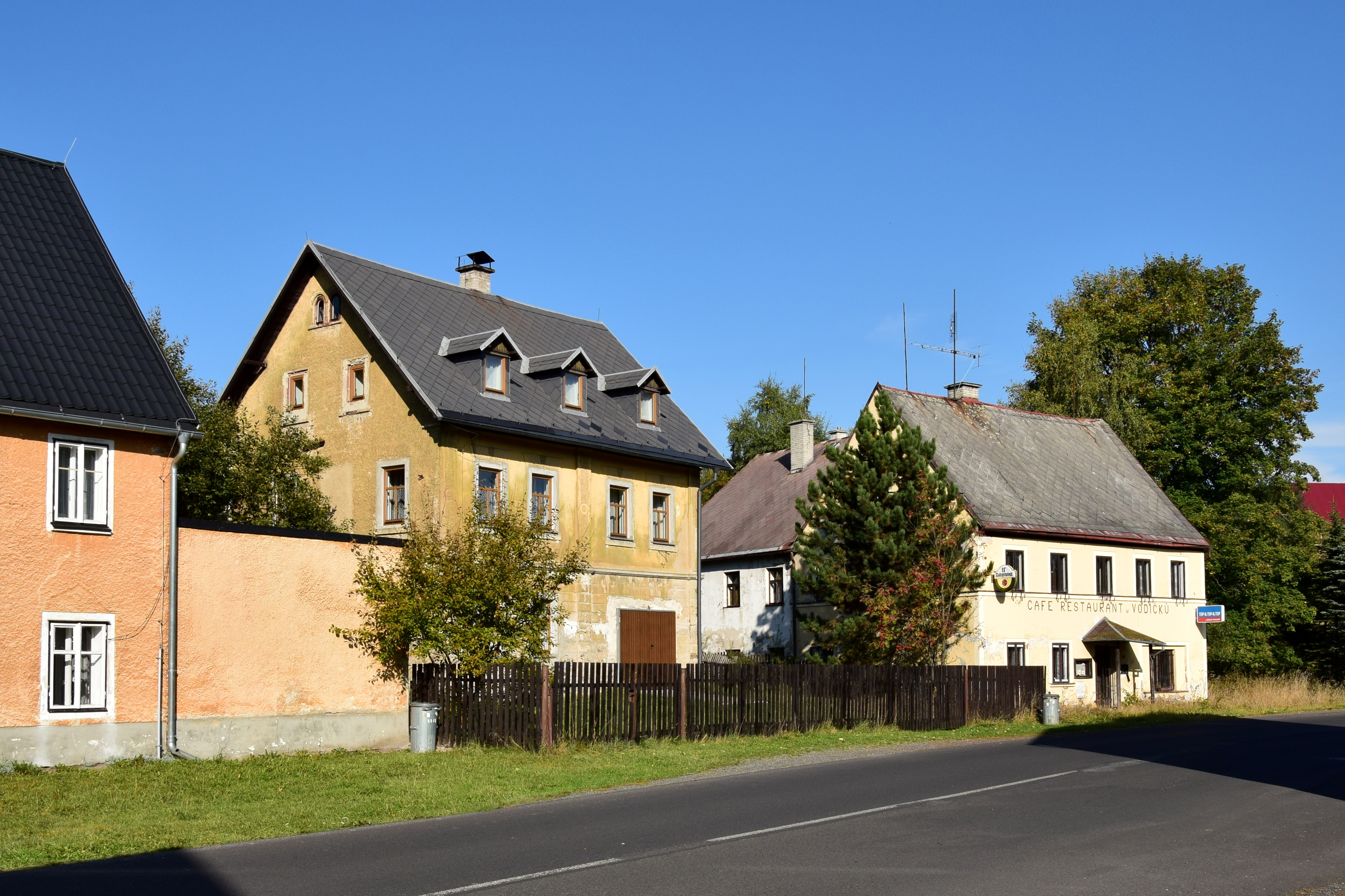 Kovářská – domy čp. 412 a 91 v Dlouhé ulici